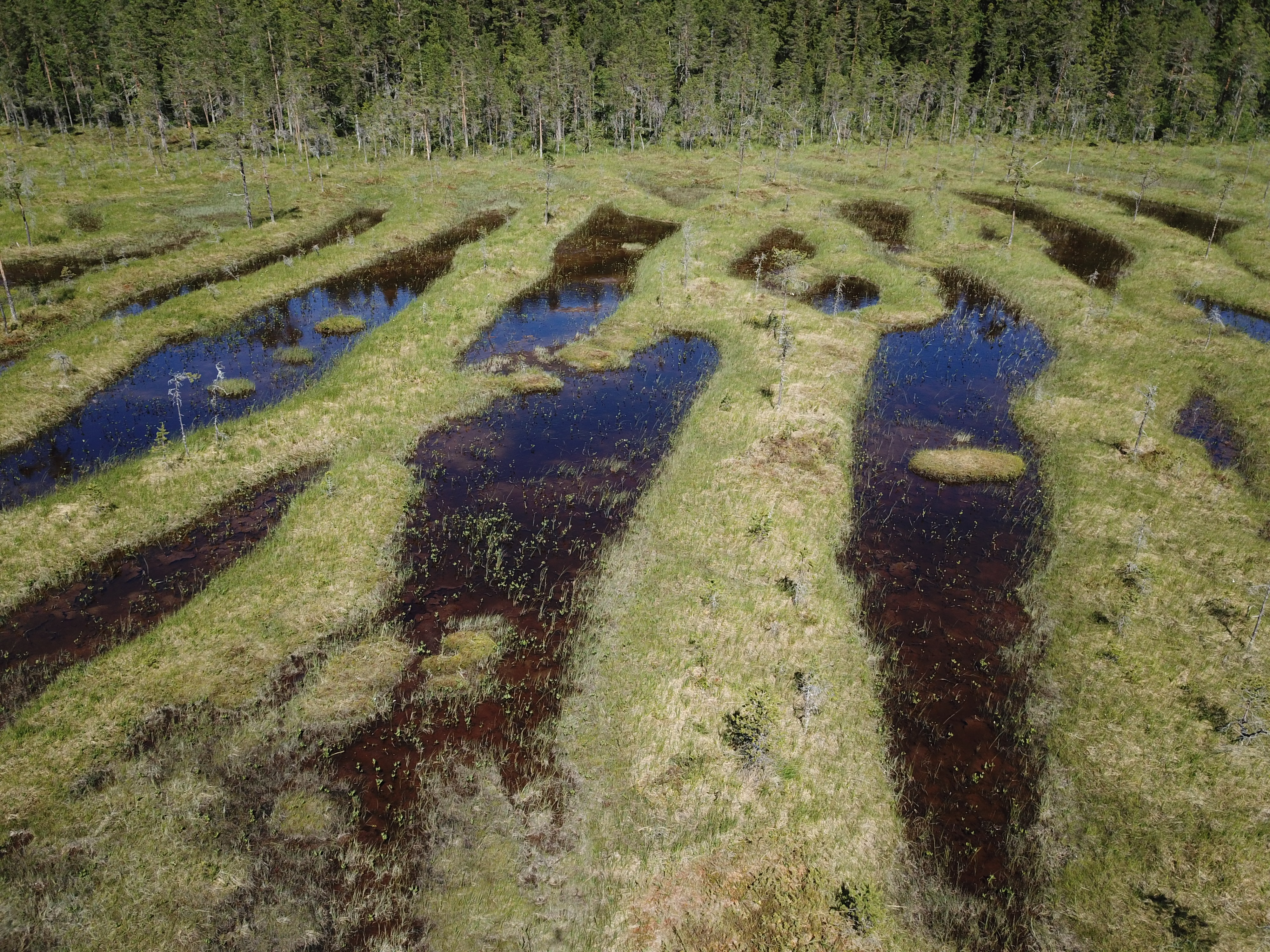 strängflarkkärr i Västernorrland. Myrtypen är en del av aapamyrkomplexet.